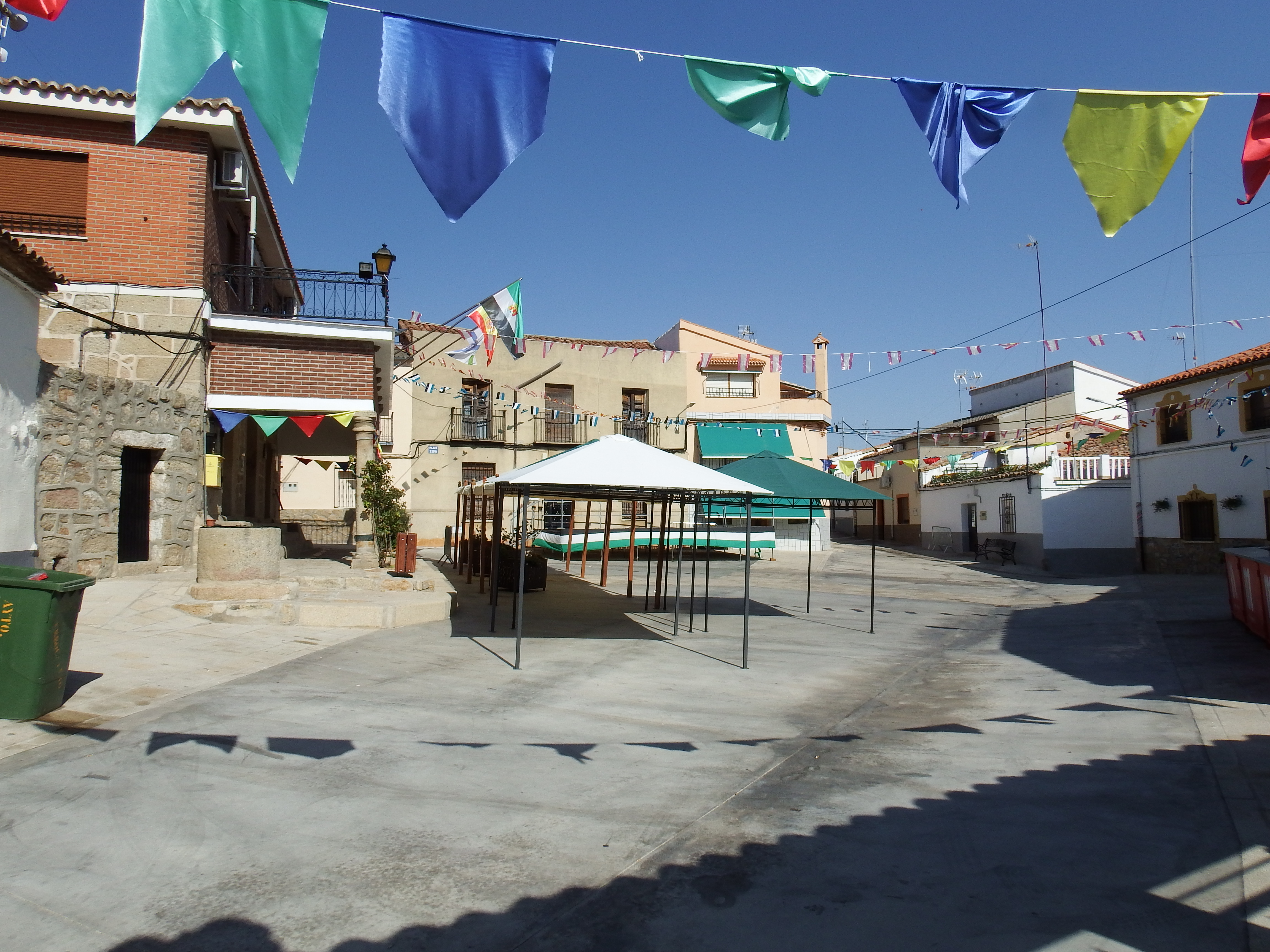 Berrocalejo